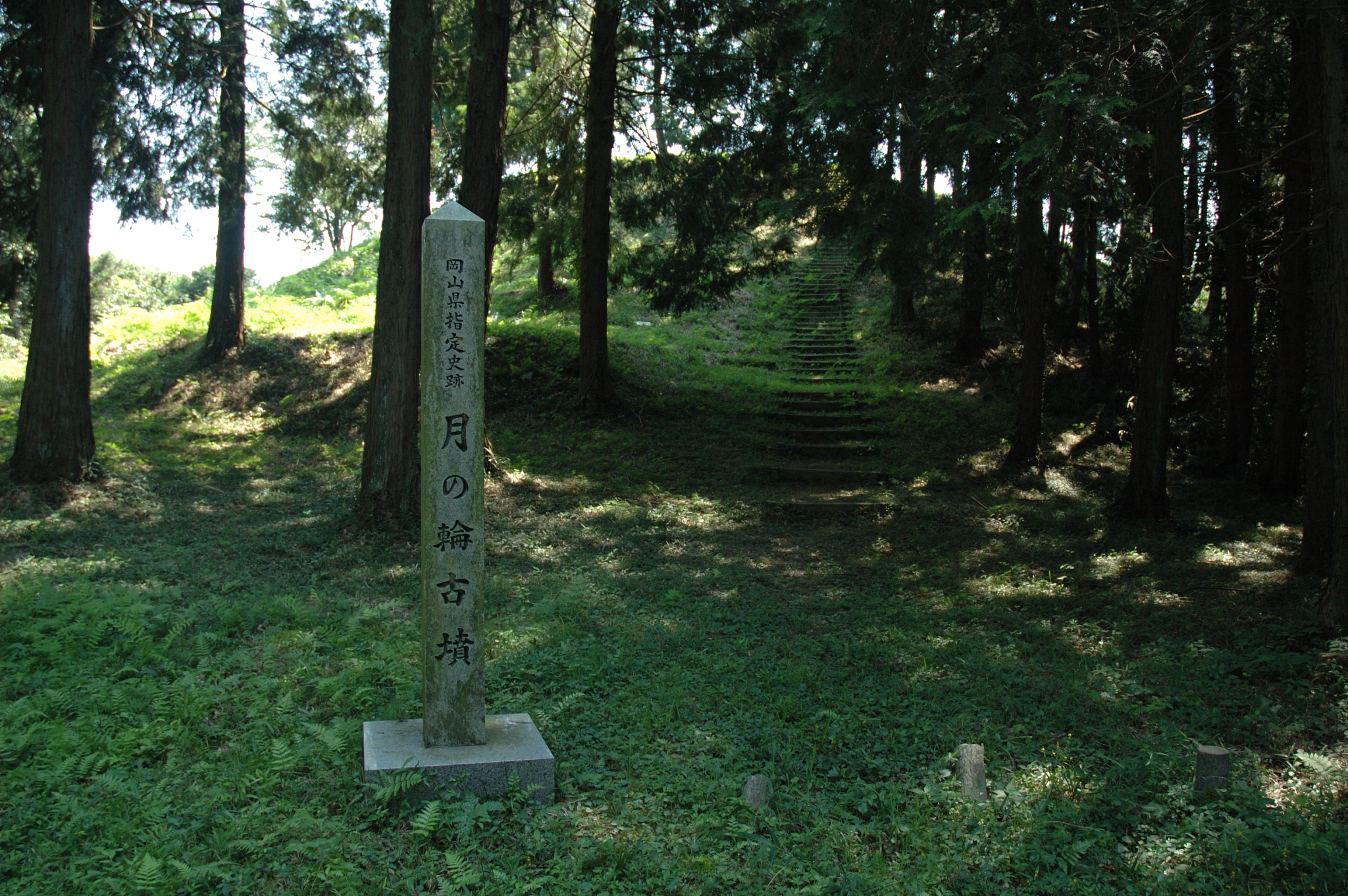 Tsukinowa Kofun mound